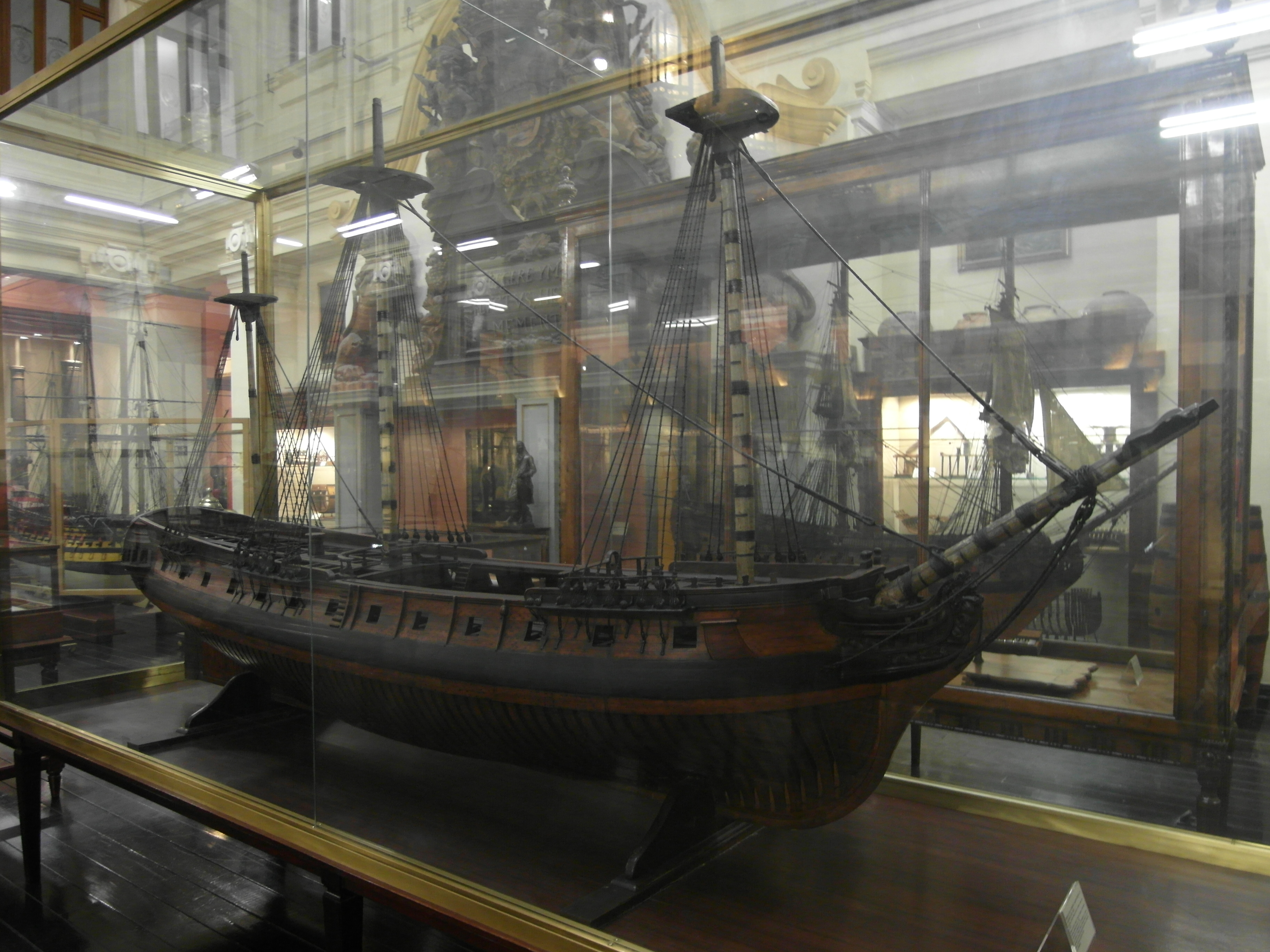 Fragata Santa Rosalía, de 26 cañones, construida hacia 1770 en Cartagena, según un modelo de la época. Participó en una expedición a la isla de Pascua. Se dio de baja en 1802.